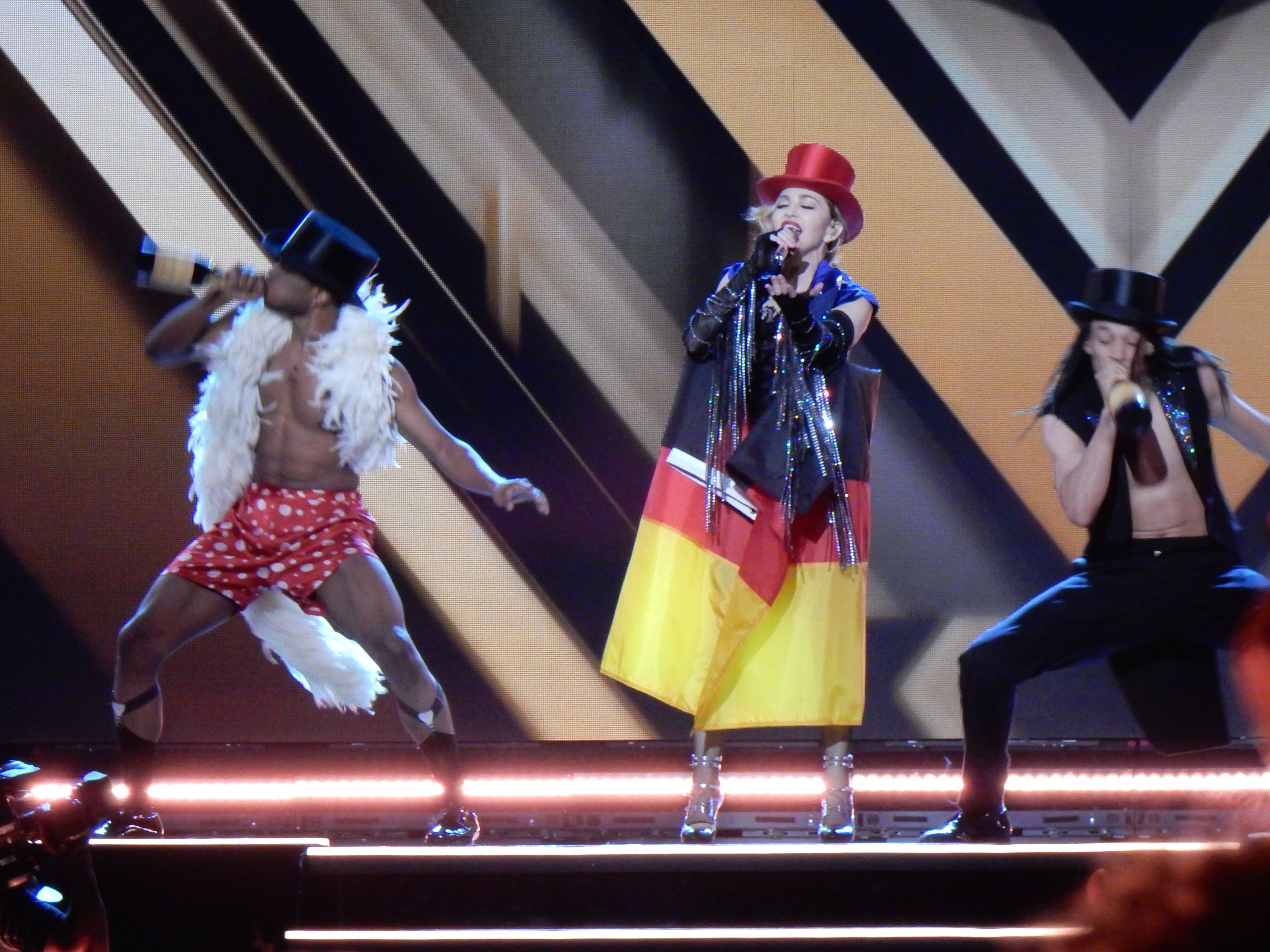 Madonna - Rebel Heart Tour Cologne 2